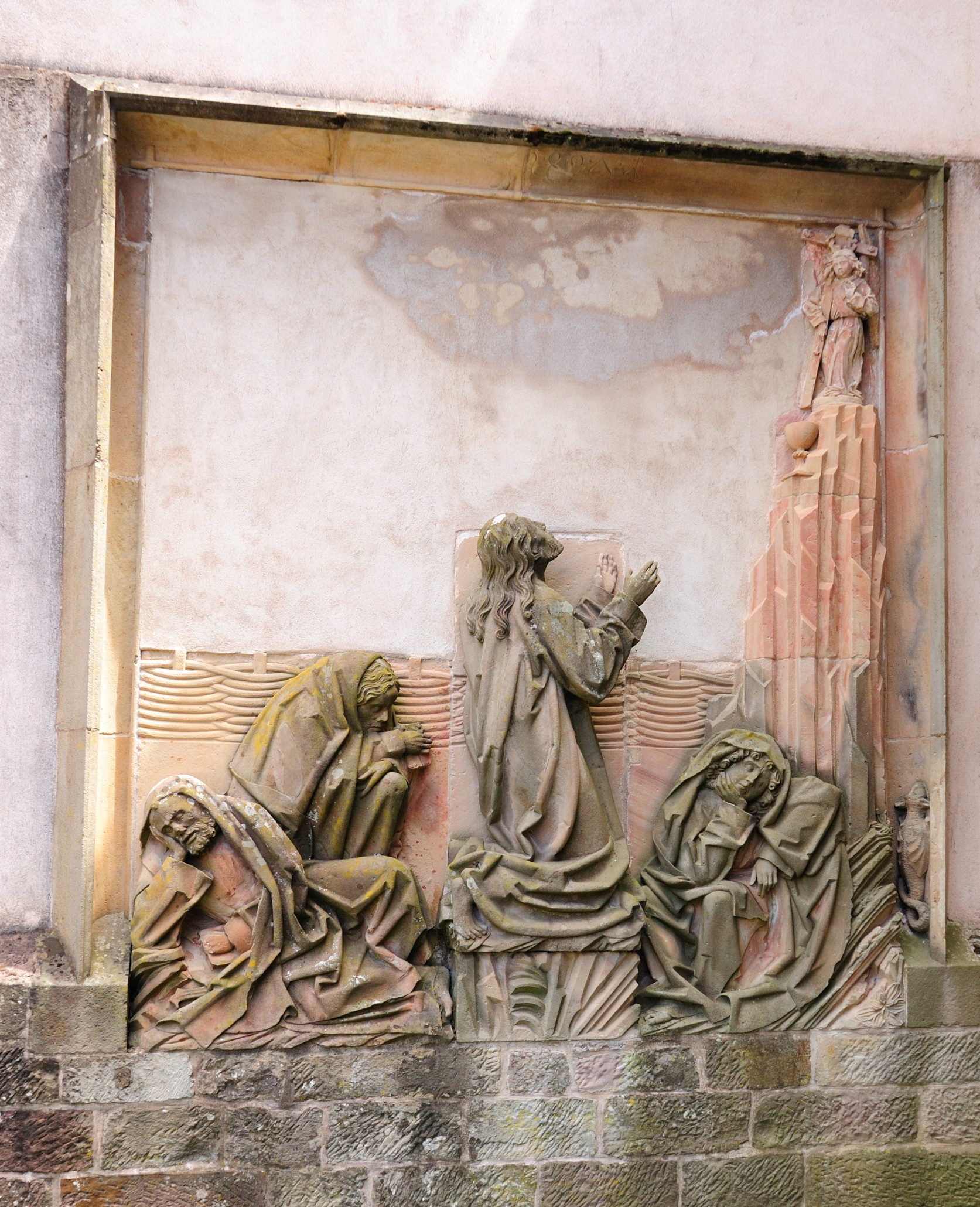 Stiftskirche Niederhaslach: Ölbergrelief (1497)